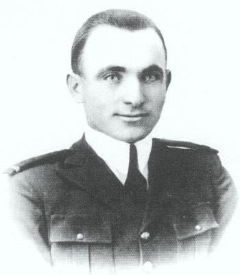 Alexandru Șerbănescu la absolvirea liceului militar.